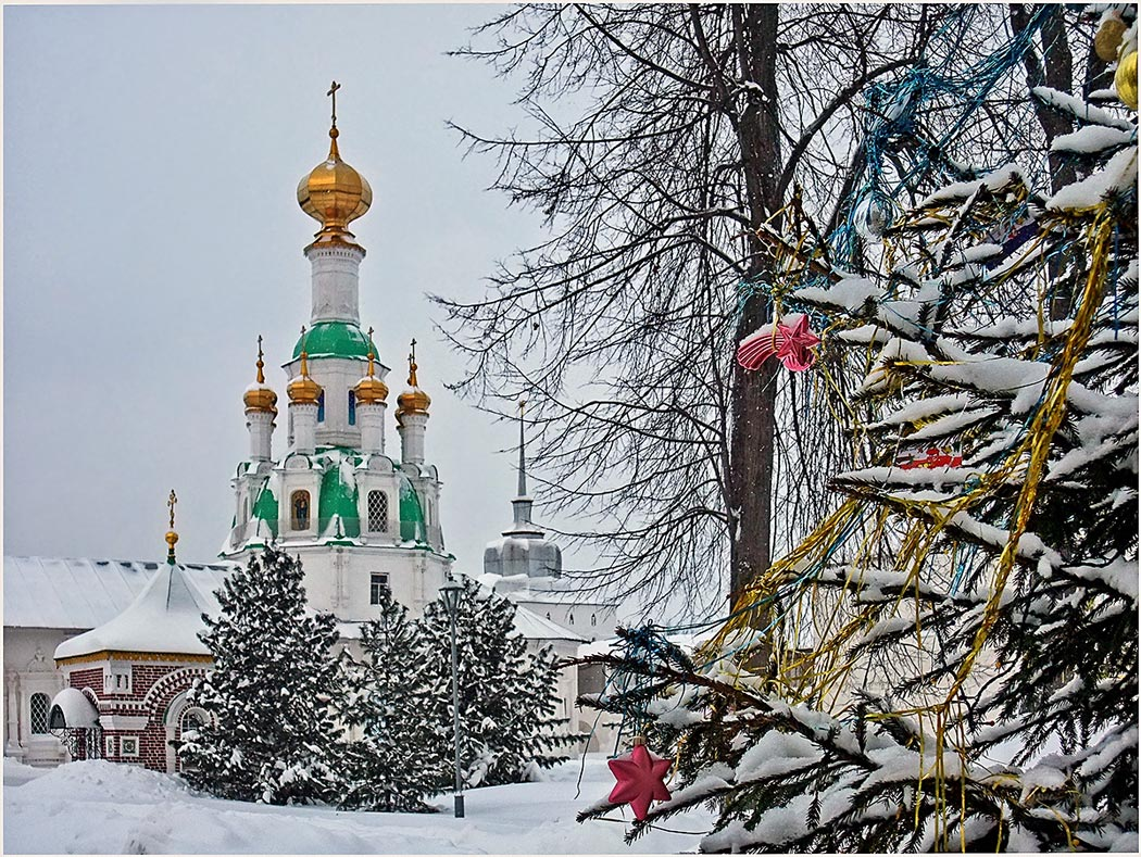 Монастырь Толгский (Ярославская область, Ярославль, посёлок Толга)